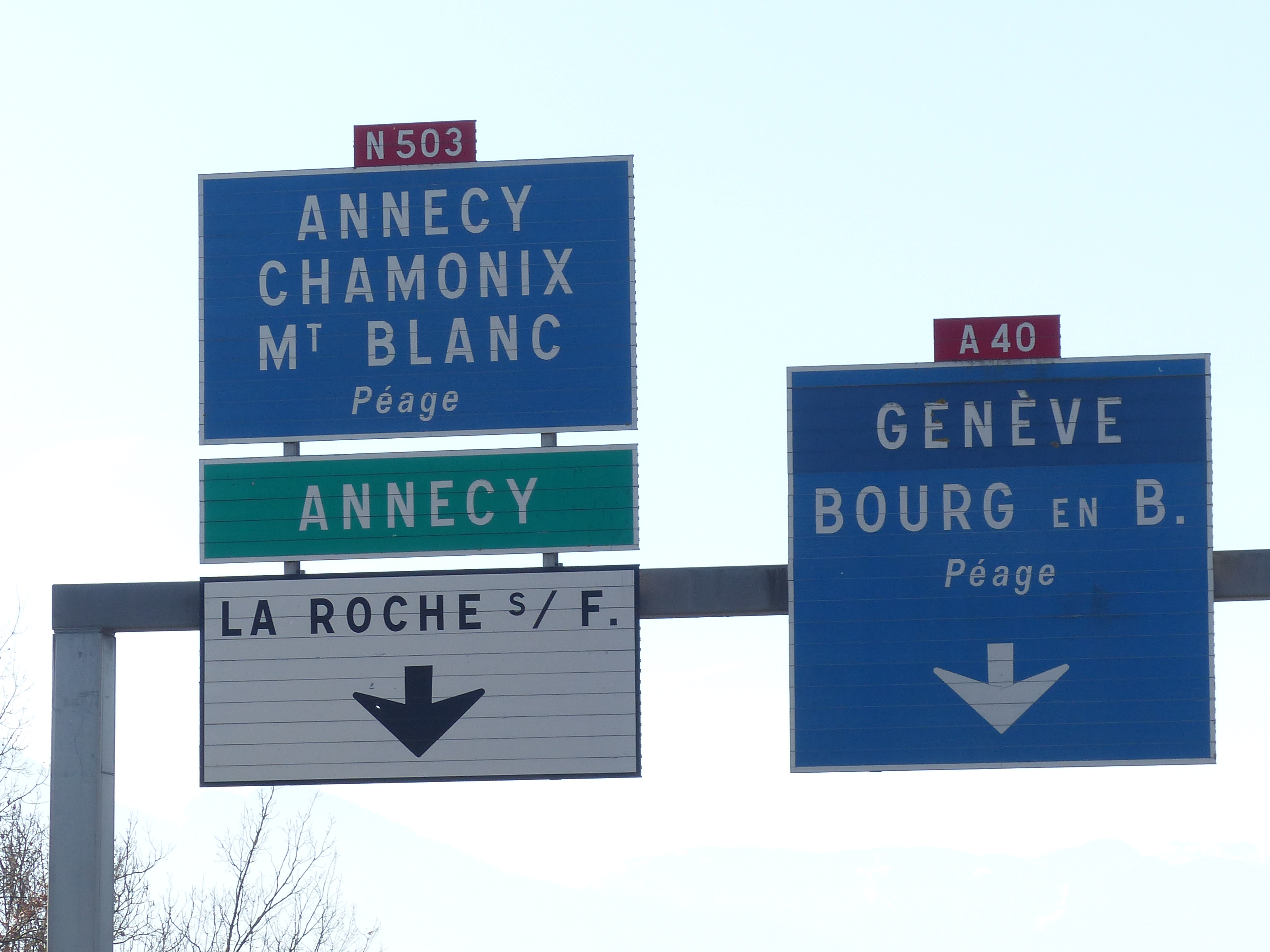 Panneau Da31b avec cartouche E42 N503 pour Annecy, Chamonix, Mt Blanc, La Roche s/ F., Genève, Bourg en B., entrée 15 de l'A40, Haute-Savoie, France.